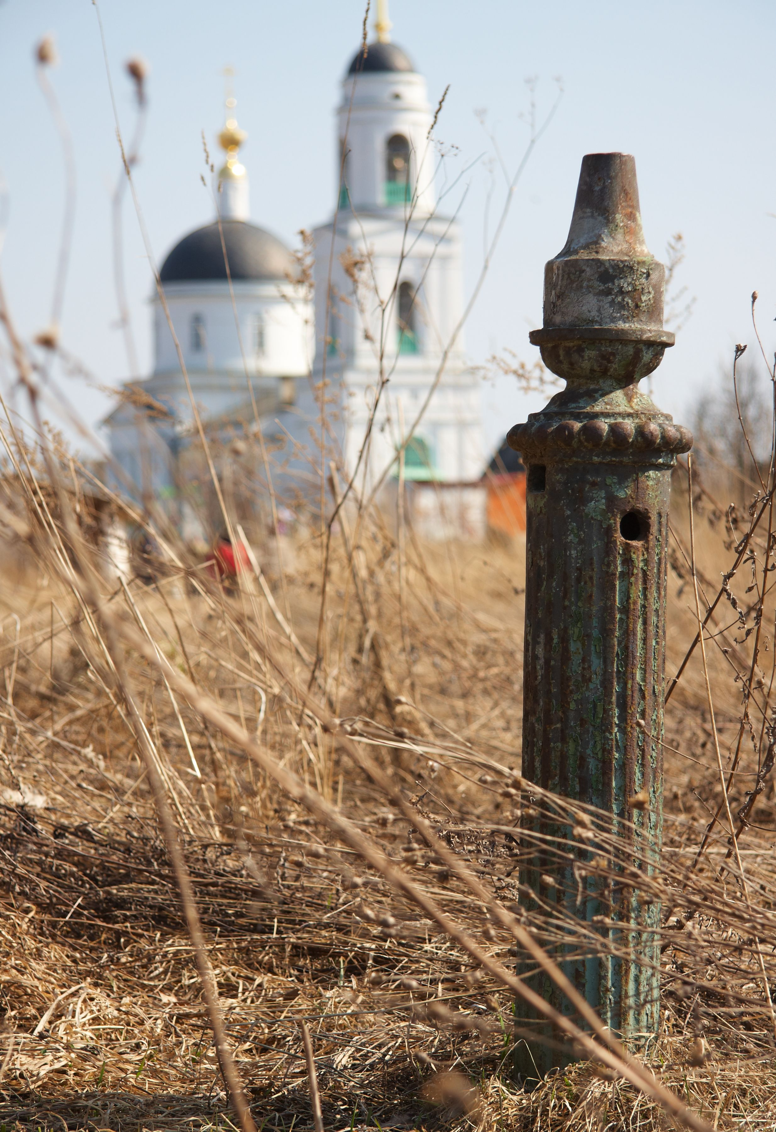 Храм Преображения Господня в селе Радонеж (Городок) (Московская область, Сергиево-Посадский район).